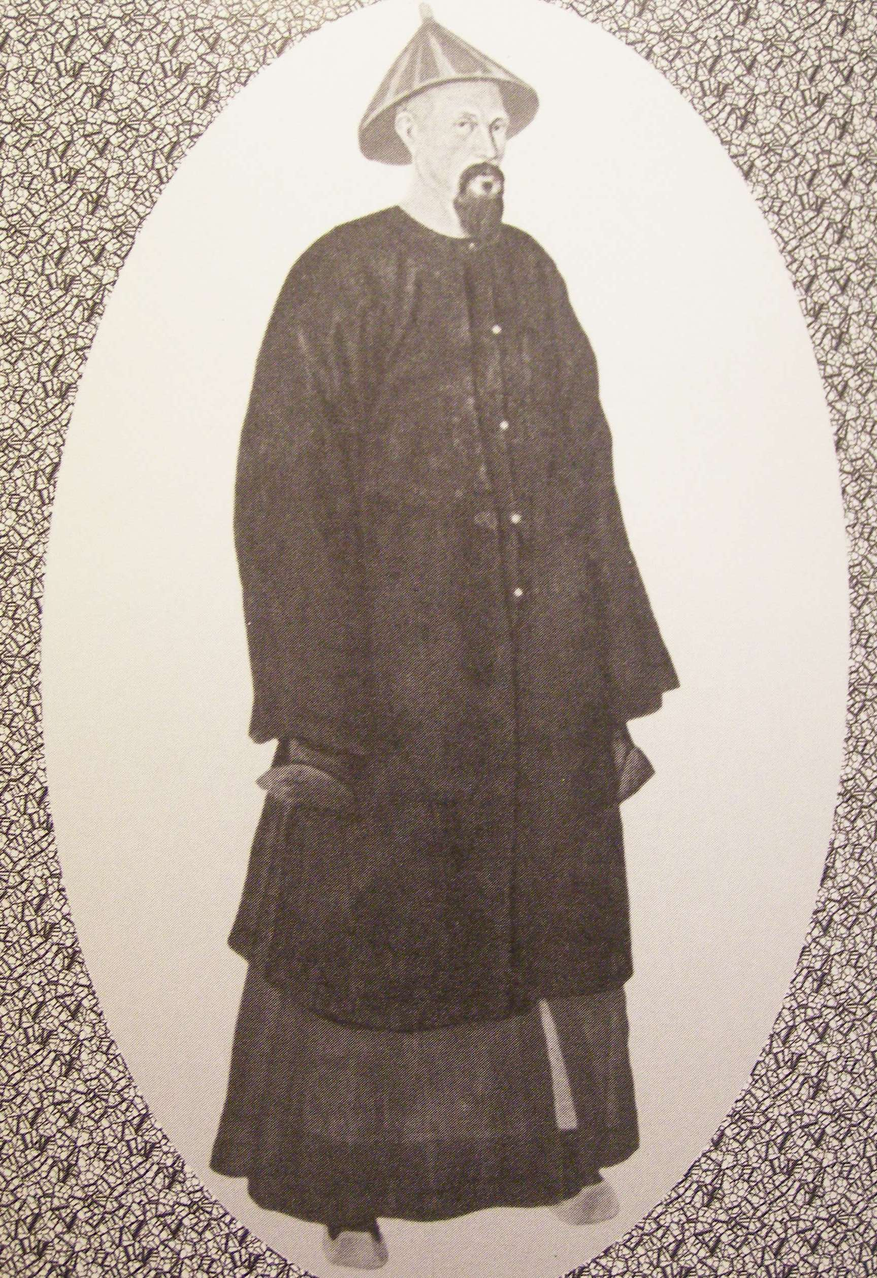 Архимандрит Иакинф (1777 - 1853)